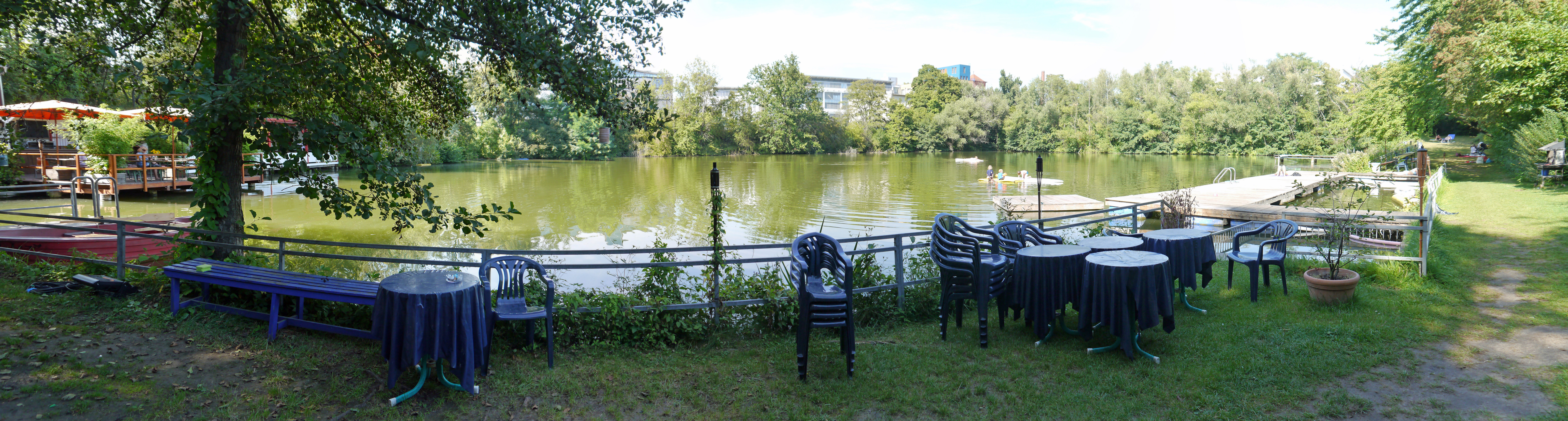 Schwedlersee-Freibad, von der Schwimmerzugangsseite (Sued). 2012 im Osthafengelände in Frankfurt-Ostend.